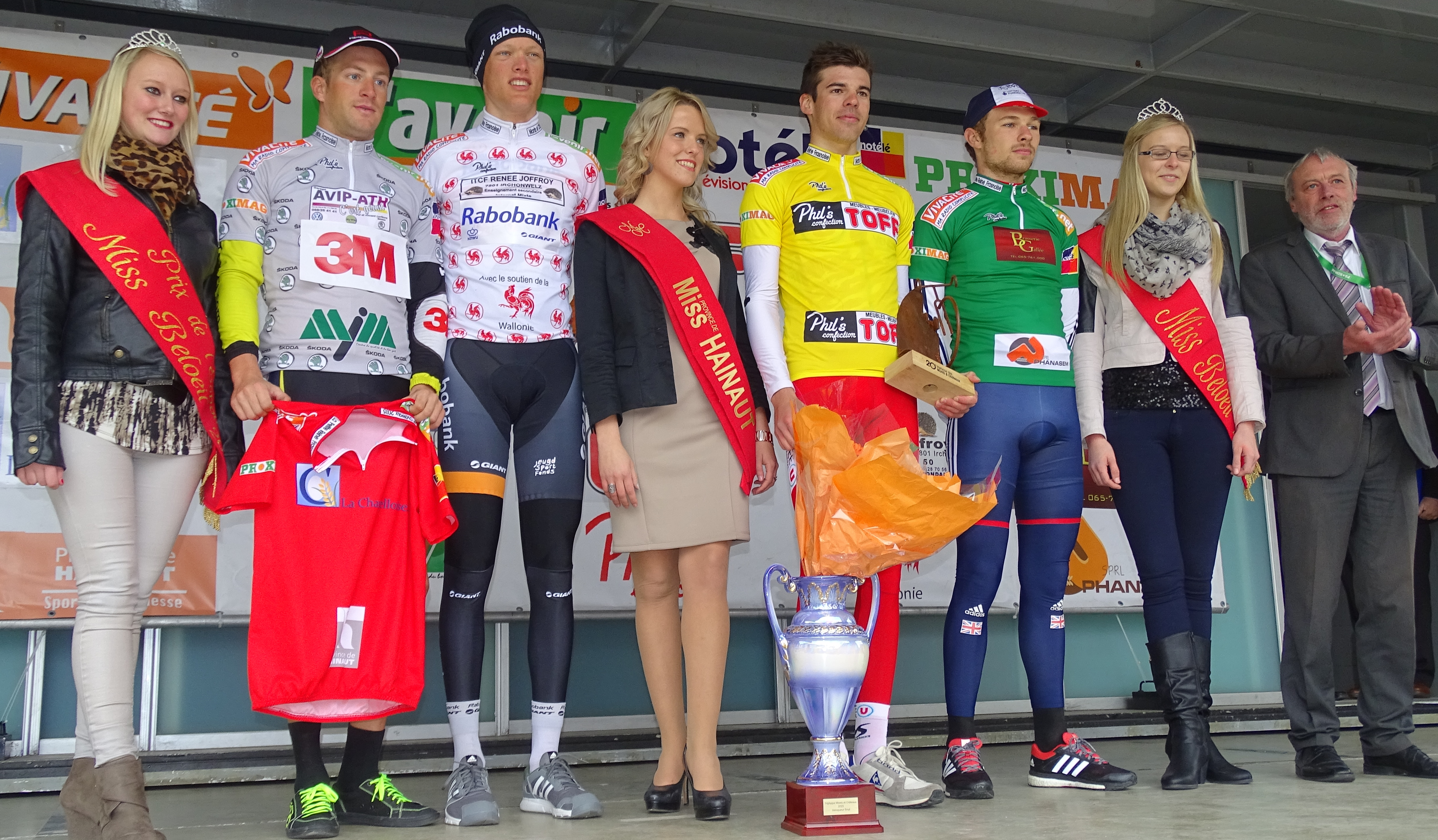 Triptyque des Monts et Châteaux 2015 Depicted person: Nicolas Vereecken Depicted team: 3M, Rabobank Development, Vendée U, Équipe nationale du Royaume-Uni espoirs